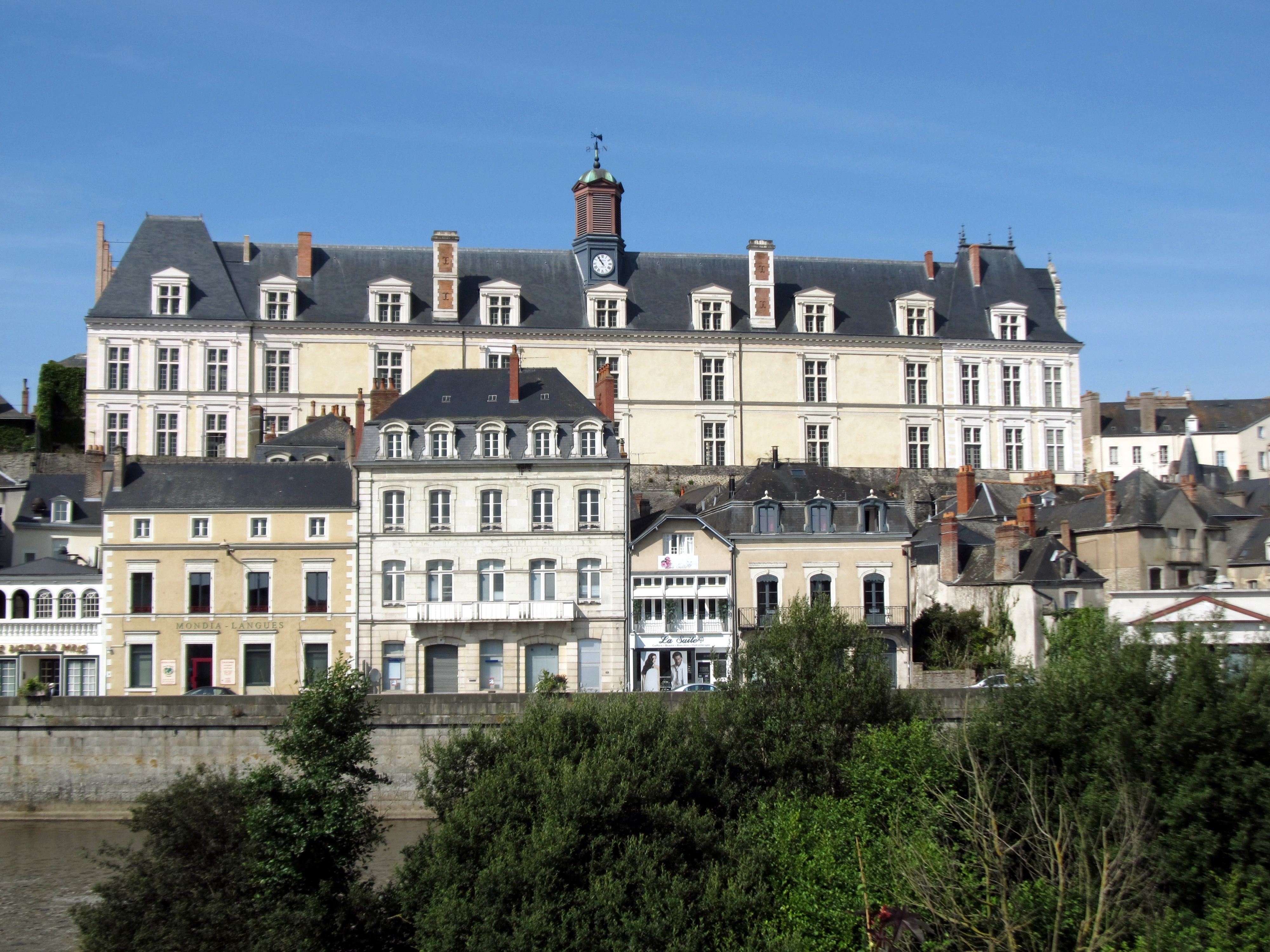 Château Neuf, Laval, Mayenne, France.